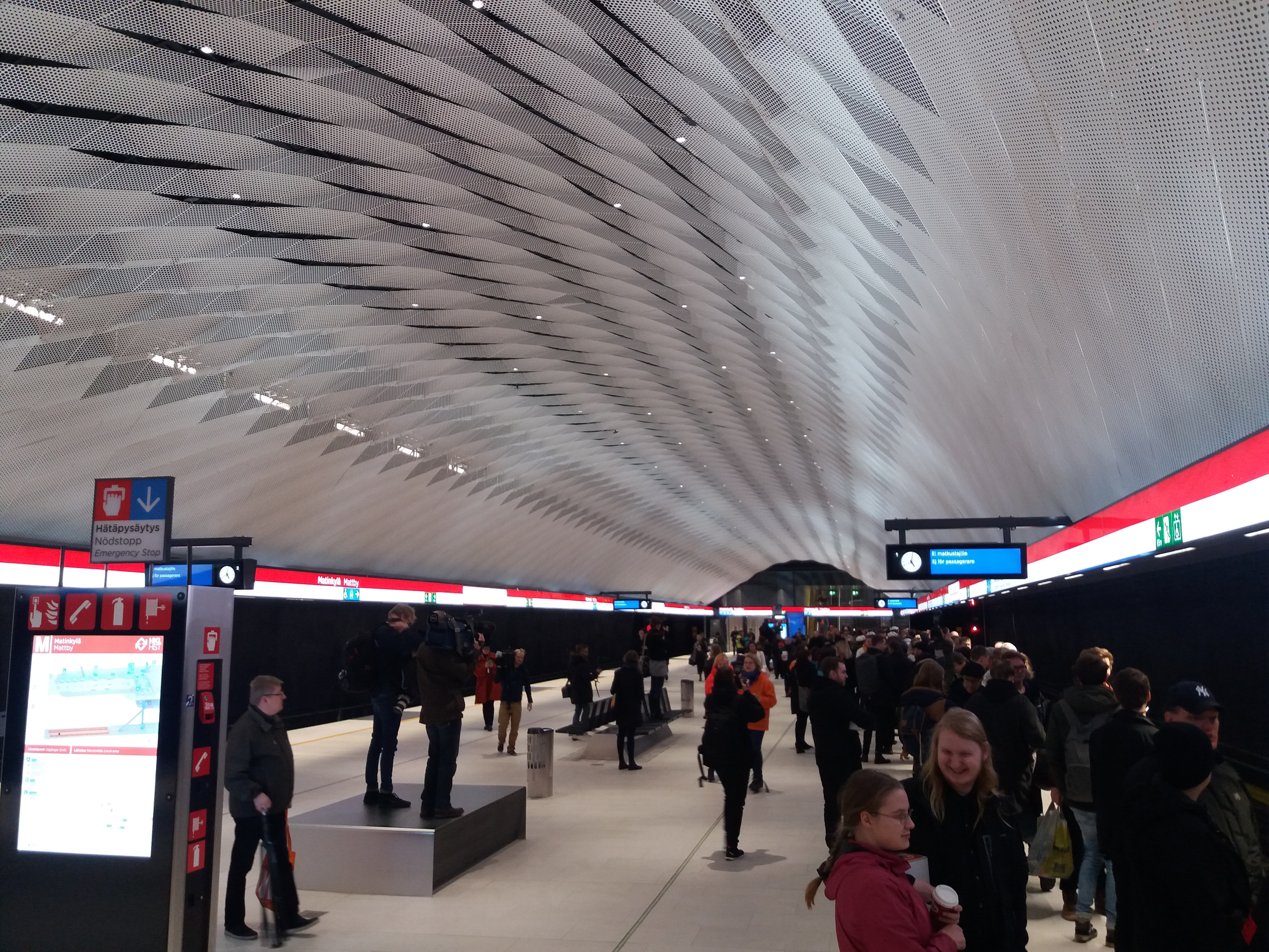 Matinkylän metroasema Länsimetron avajaispäivänä.